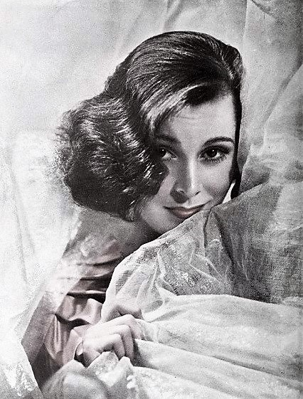 Frances Dee